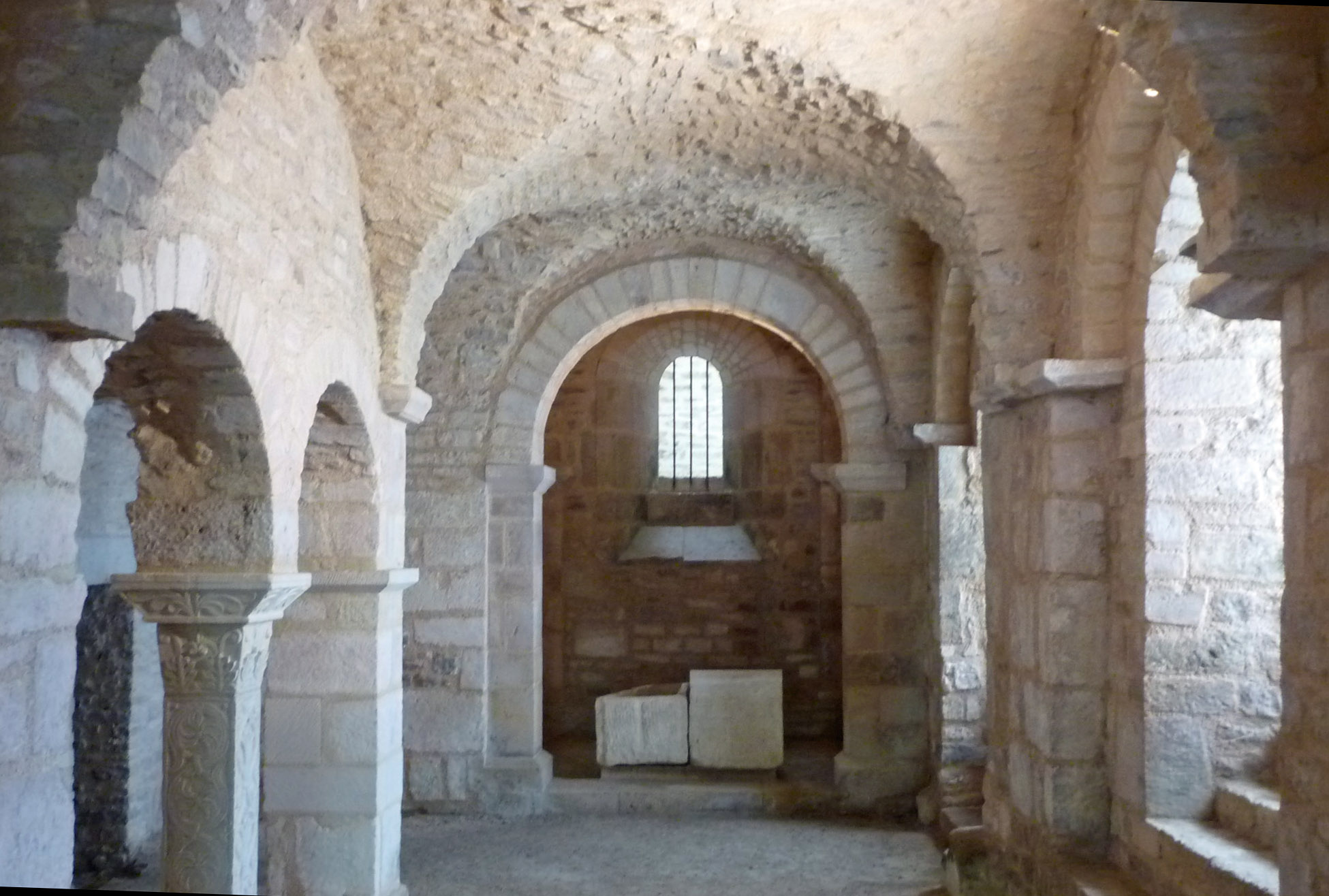 Karolingische Krypta der ehemaligen Abtei St-Pierre in Flavigny-sur-Ozerain